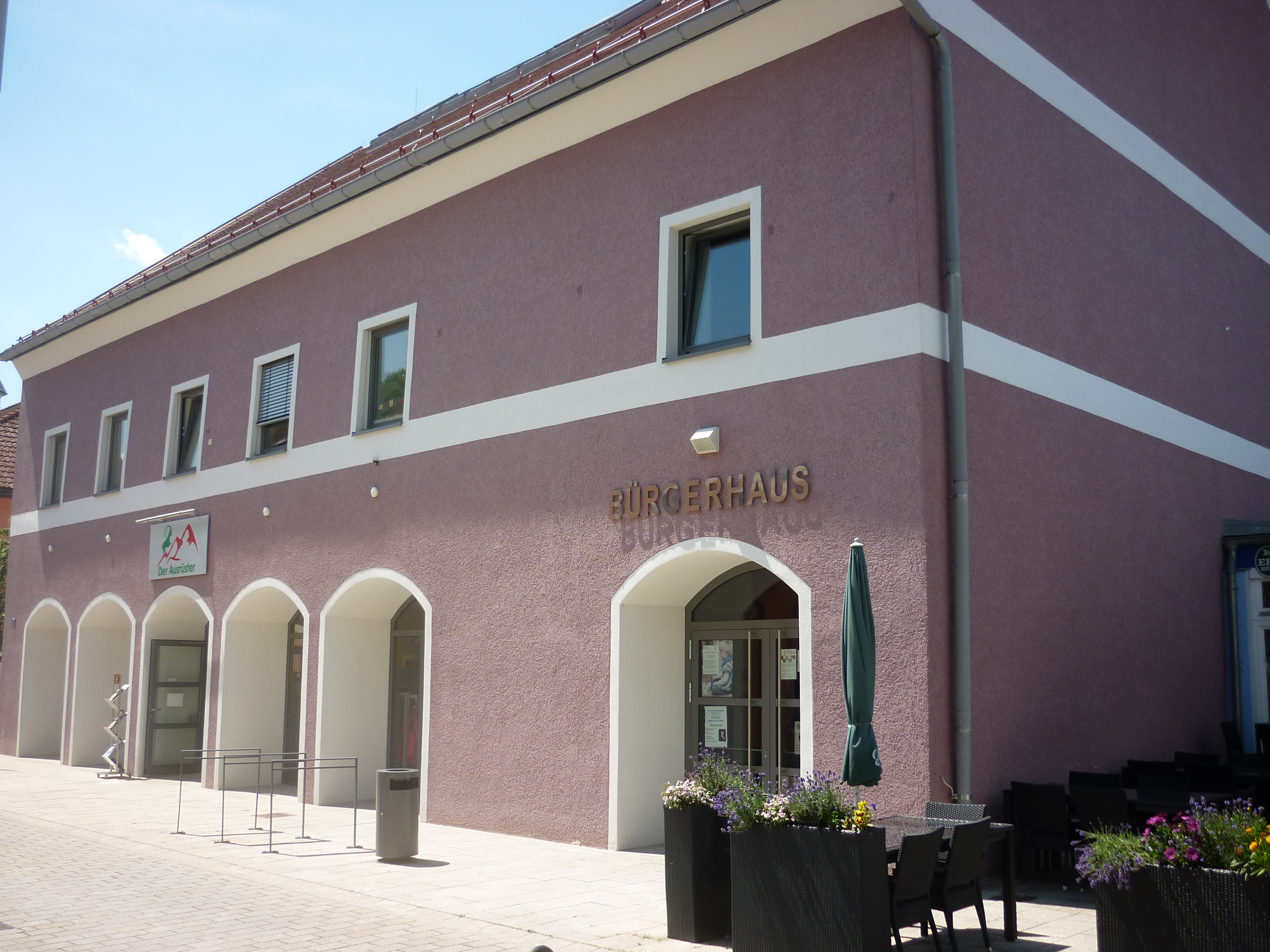 Bürgerhaus mit Bürgersaal Wörth an der Donau